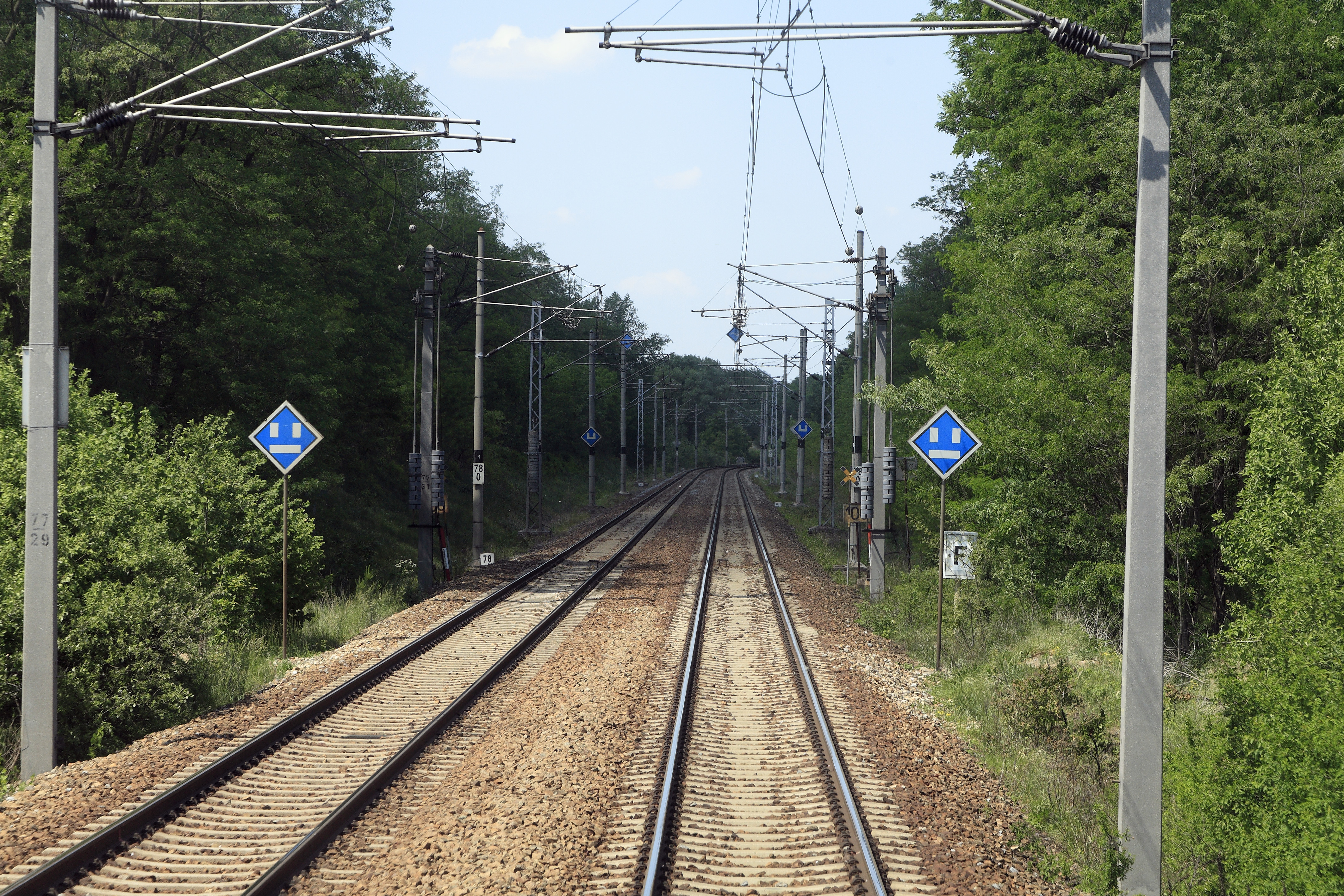 Österreichische Nordbahn Richtung Břeclav (Lundenburg), die Systemtrennstelle zwischen 15kV im österreichischen und 25kV im tschechischen Netz liegt praktisch auf der Grenzlinie. Fahrleitungsgeometrie und Schleifleistenmaterial sind auf beiden Seiten identisch, damit ist ein Abbügeln unnötig. Die Systemtrennstelle erstreckt sich über zwei allerdings recht kurze Mastfelder, je zwei hintereinandergeschaltete Streckentrenner bilden das neutrale Stück, die zwei hintereinandergeschaltete Streckentrenner auf der österreichischen Seite bilden das neutrale Stück, zwischen diesen und dem kleinen Streckentrenner mit dem Mast mit der Kilometertafel 78,0 mit sichtbarer fester Erde ist das Kettenwerk geerdet. Zwischen dem kleinen Streckentrenner und dem folgenden vor dem Winkelmast liegt der neutrale Abschnitt auf der ČD-Seite.